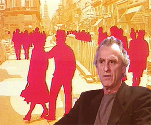 Portrait de Gérard Fromanger